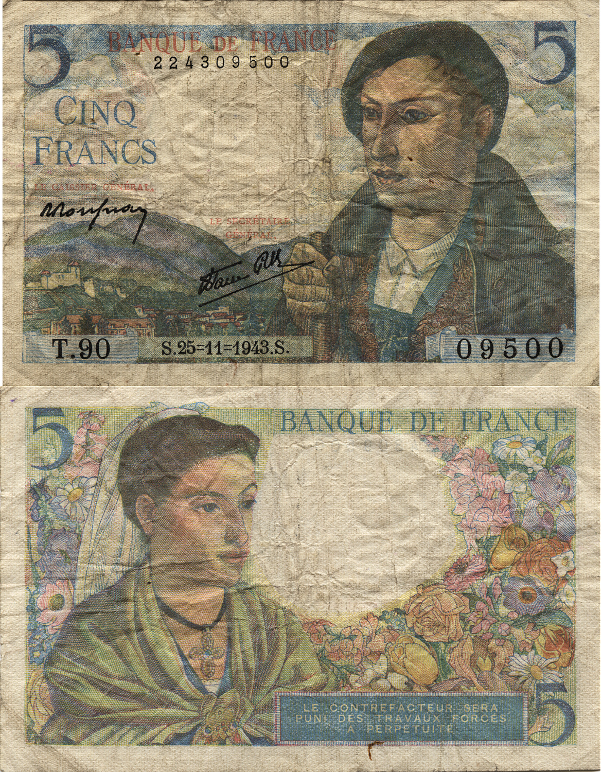 5 Francs, Frankreich, 1943